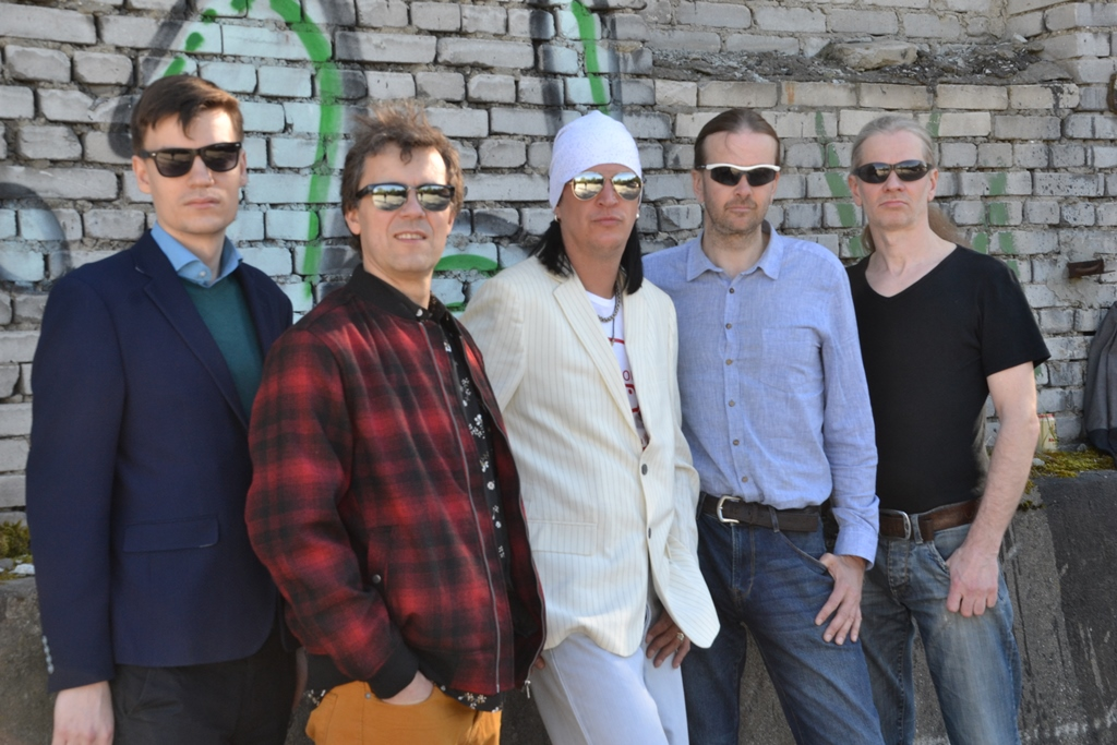 4 Tankisti & Rebane